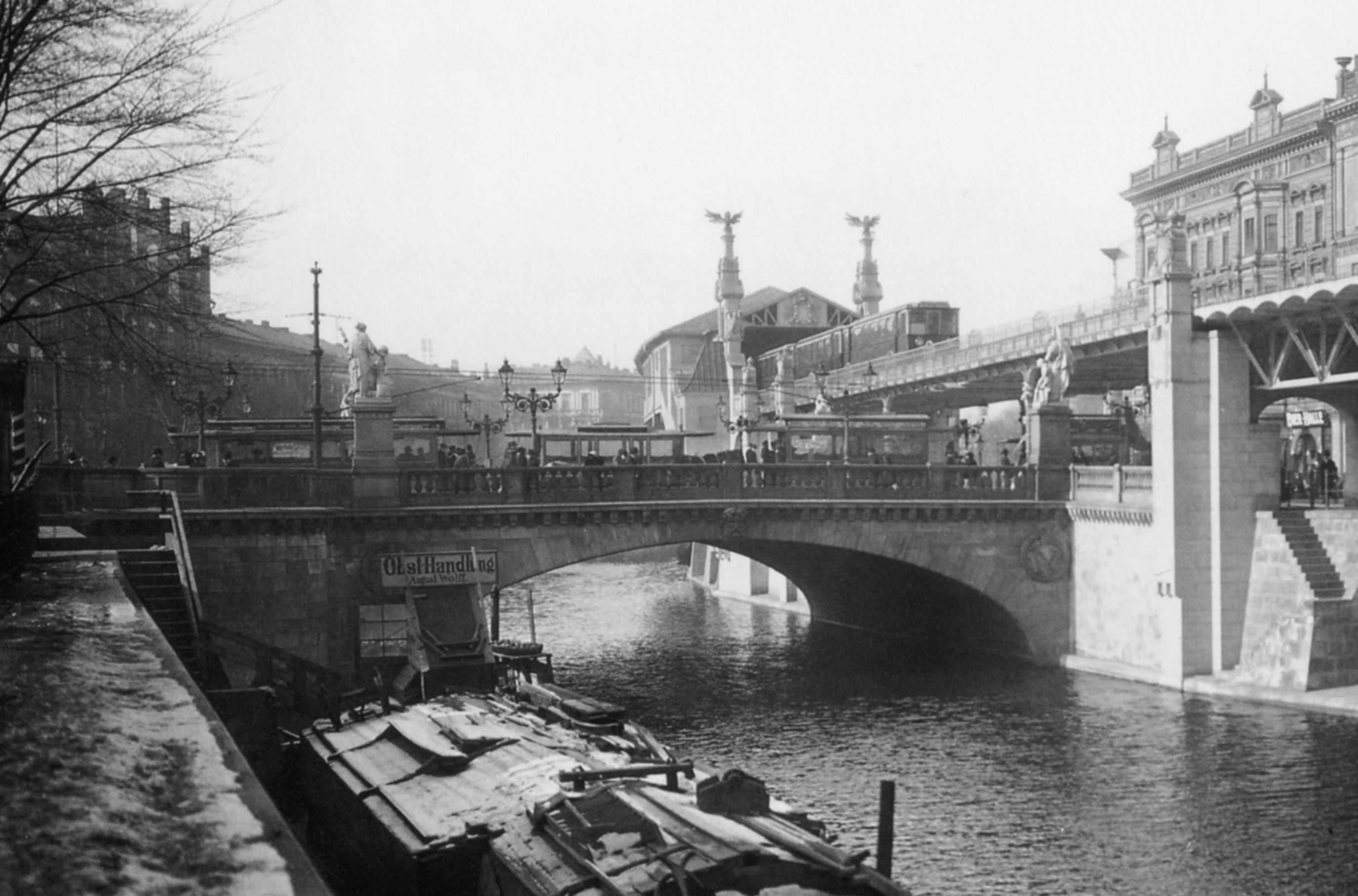 Belle-Alliance-Brücke über den Landwehrkanal in Berlin